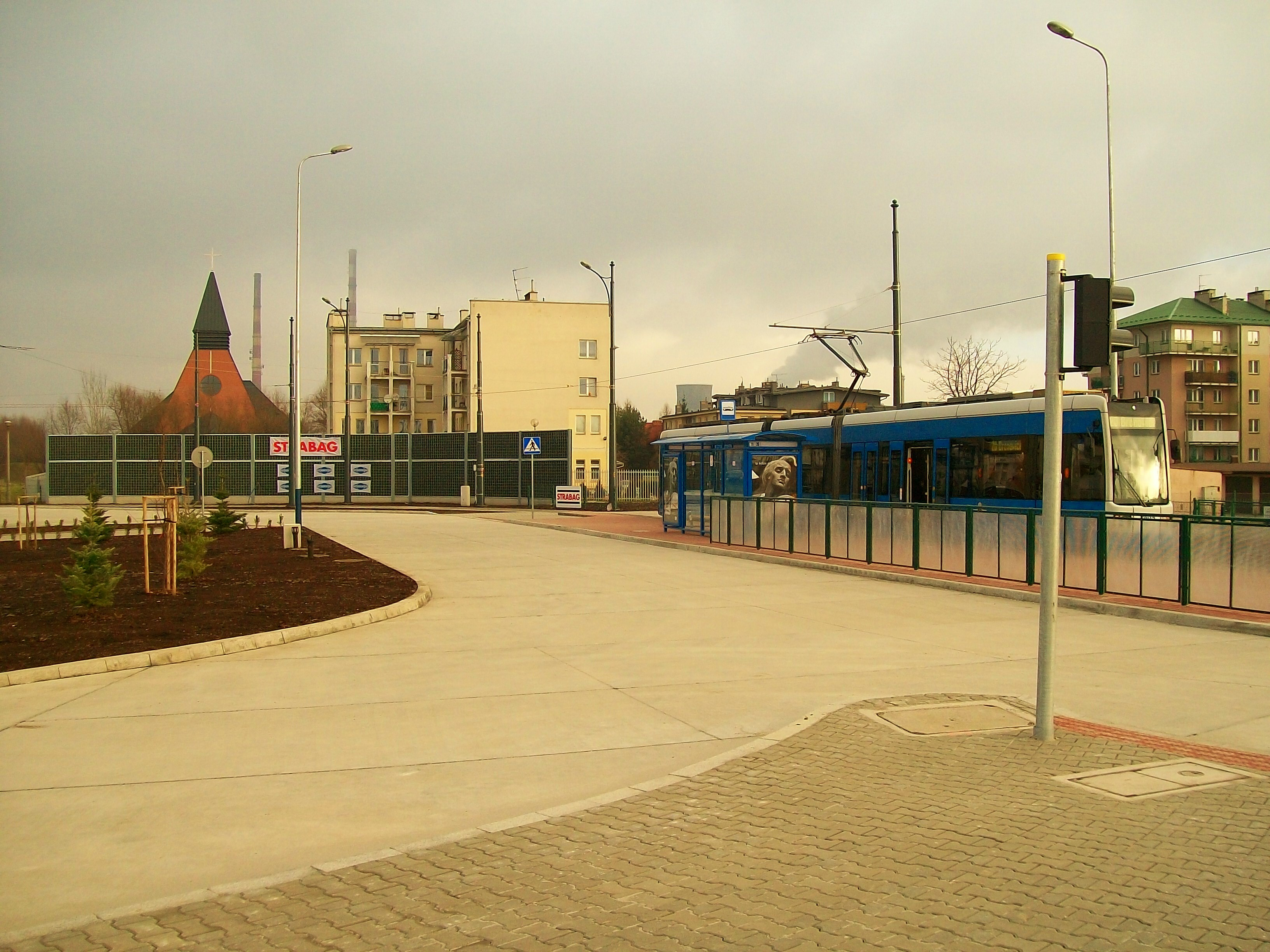 Pętla tramwajowa - Mały Płaszów